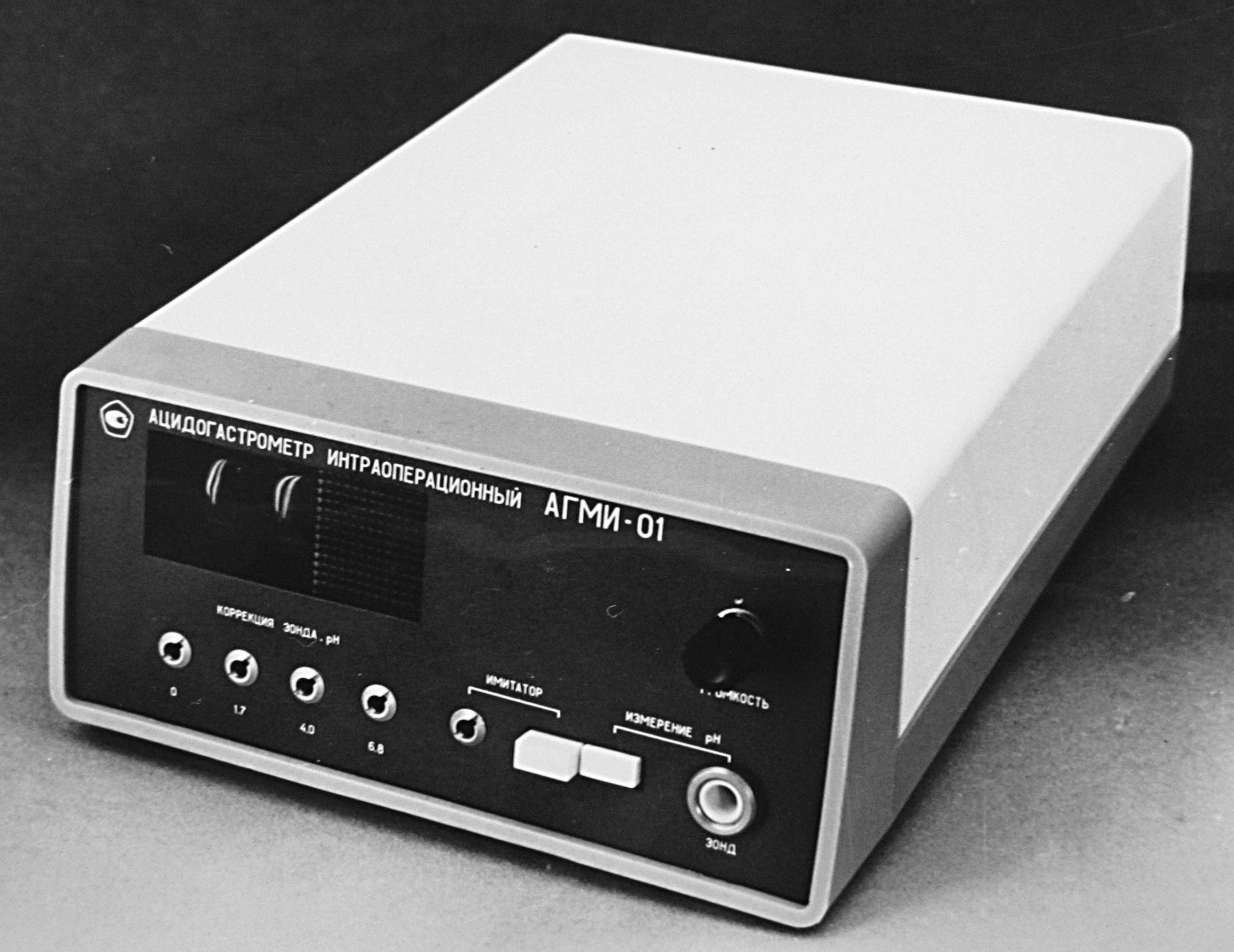 Acidogastrometr_for_surgery